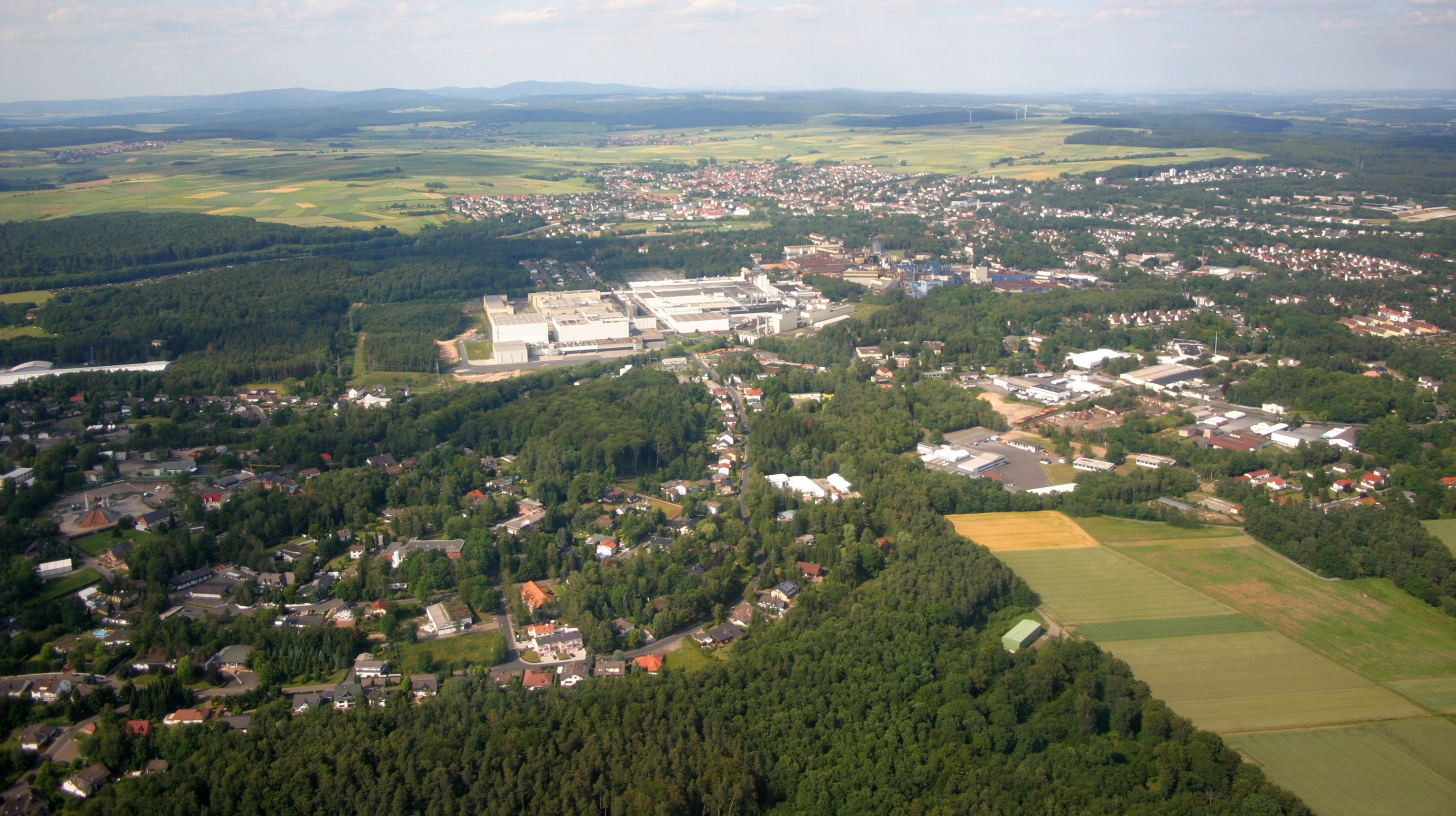 Stadtallendorf im Jahr 2004, fotografiert aus Richtung Westen. Im Foto zu sehen: Das Industriegebiet DAG mit dem Ferrero-Werk in der Bildmitte, der alte Ortskern ganz hinten, die Herrenwaldkaserne am rechten oberen Bildrand. Auf dem Foto wird die von großen Waldflächen durchzogene Bebauung deutlich.